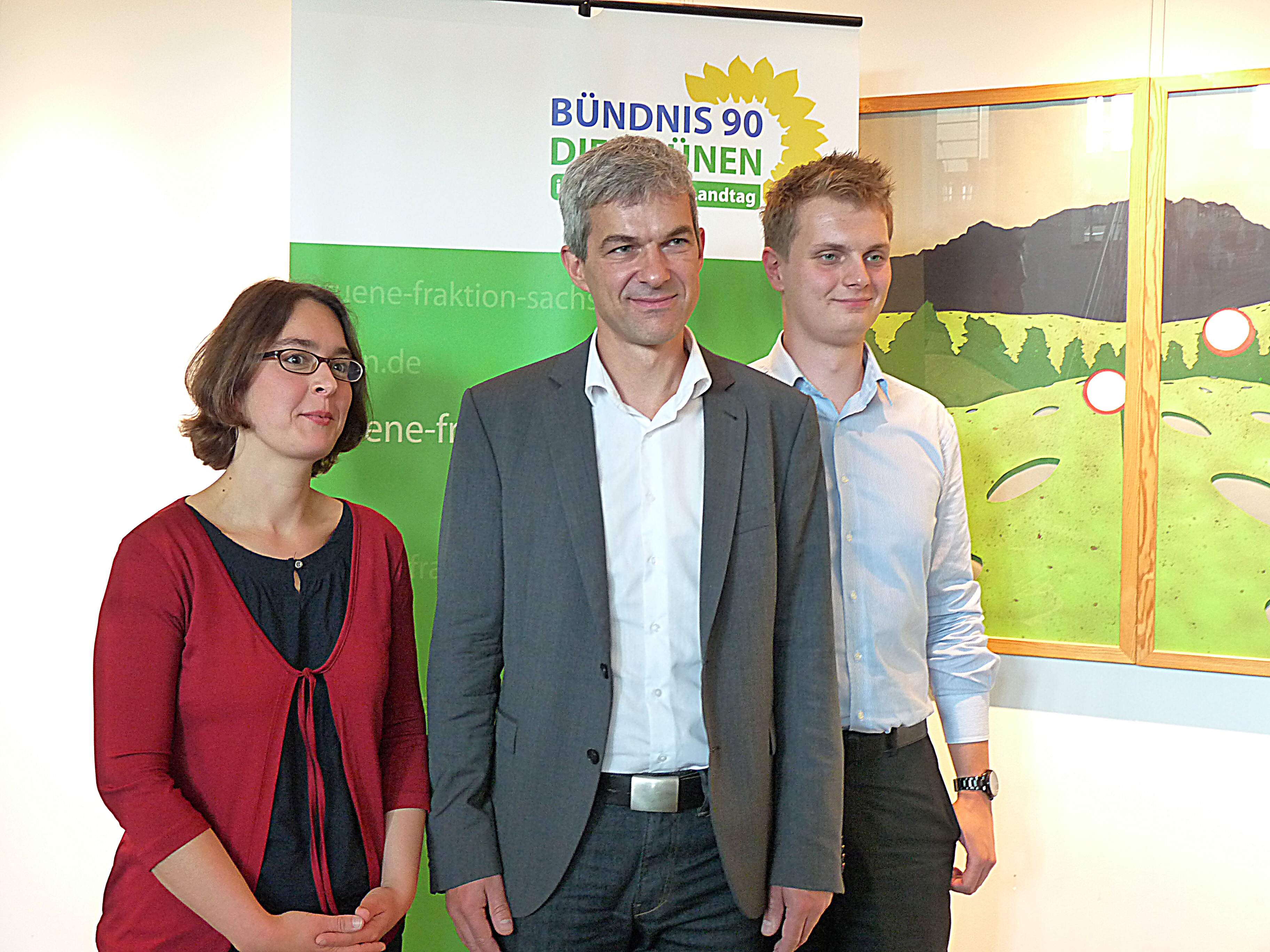 Volkmar Zschocke (Mitte) wurde am 16. September 2014 zum neuen Vorsitzenden der GRÜNEN-Landtagsfraktion Sachsen gewählt.